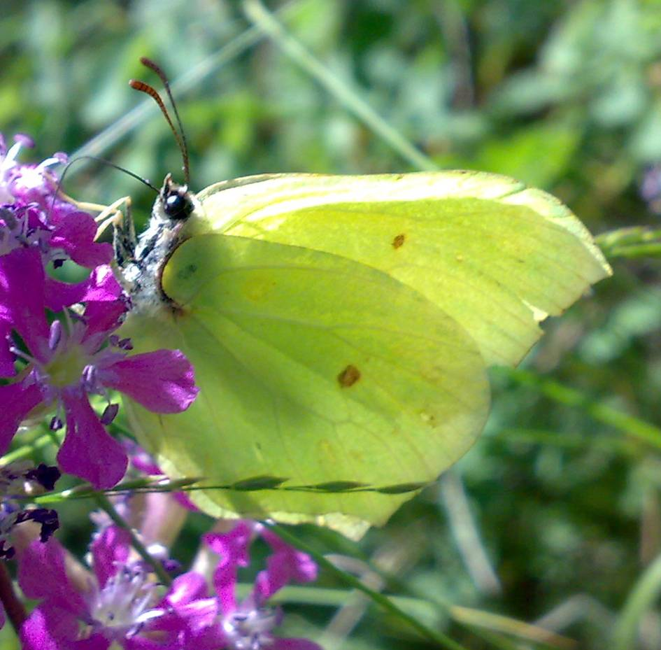 Sitronsommerfugl, på Vårmarihånd. 7.juni 2008. Hurum, Buskerud, Norge.